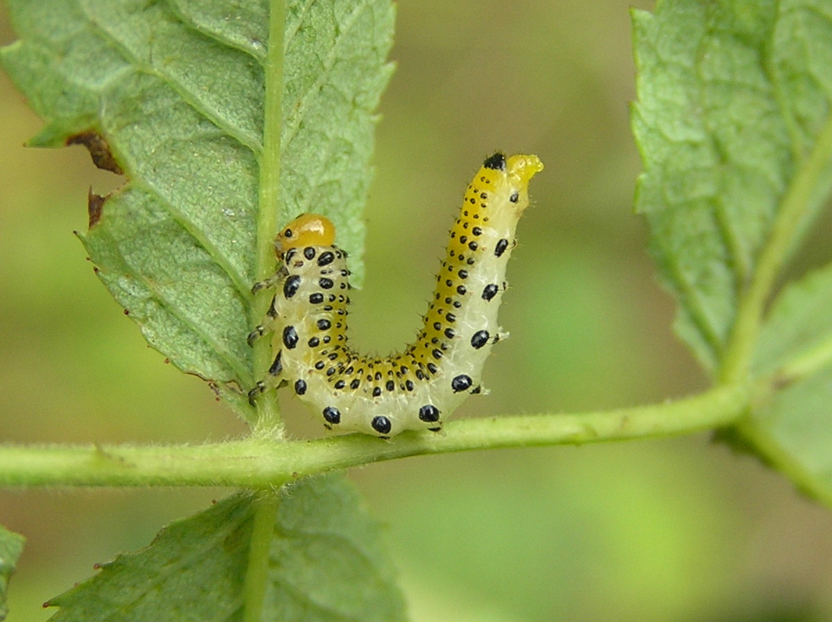 Arge pagana, Brok, Polska